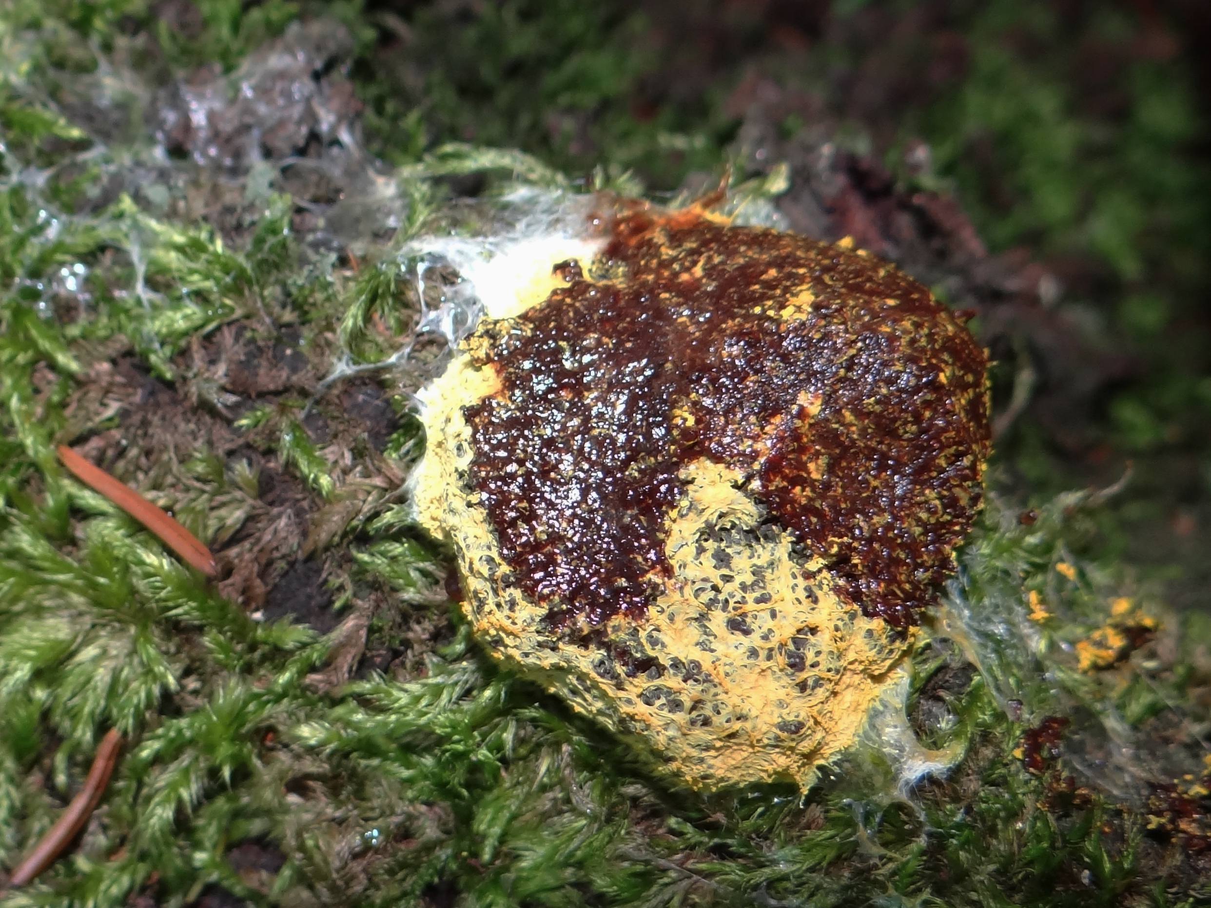 Fuligo septica (location: Poland)